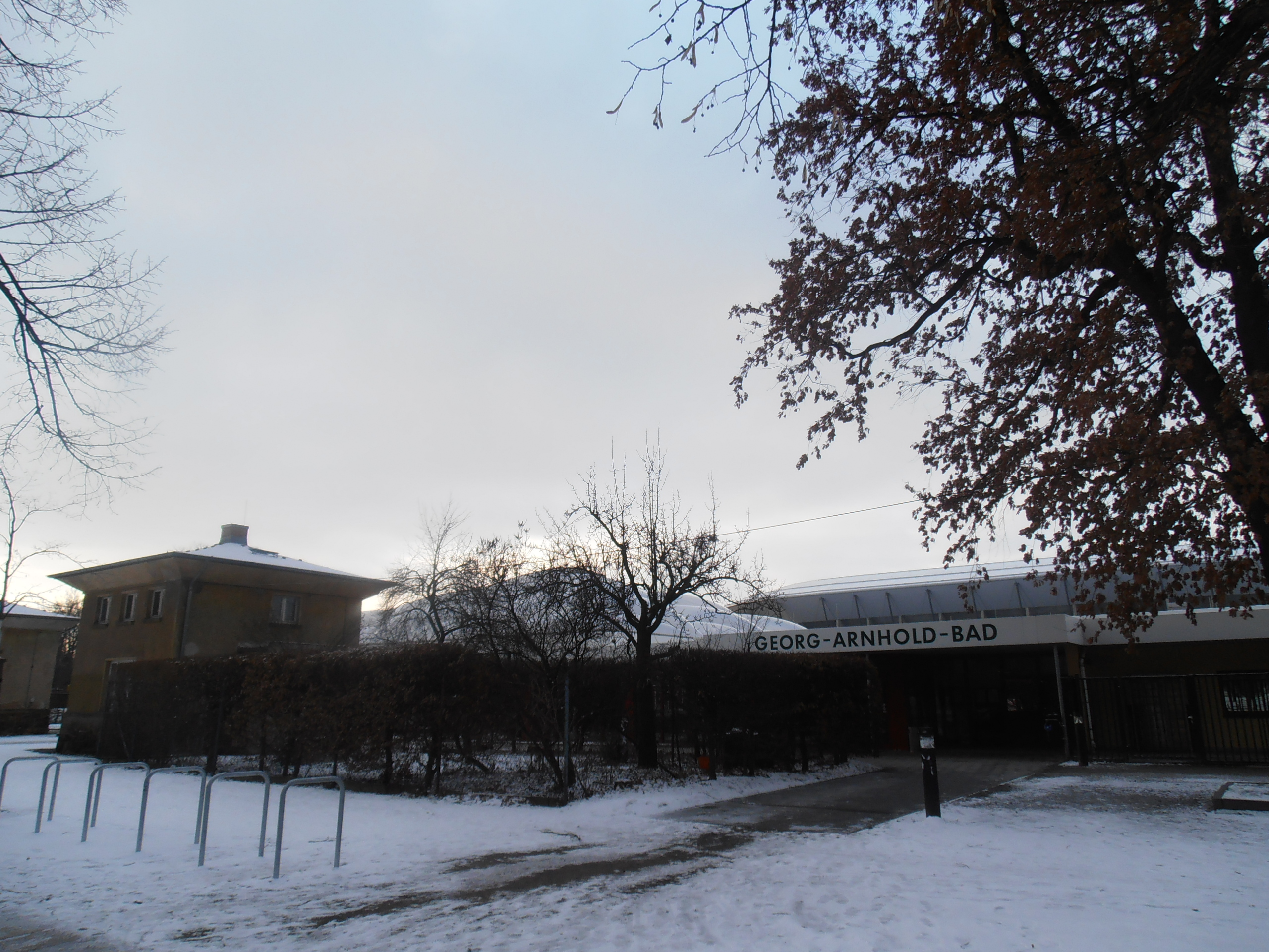 Eingang Georg-Arnhold-Bad von N, Torhäuschen